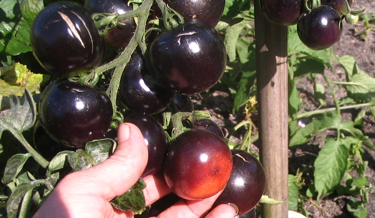 blaue Tomate Indigo rose, die sonnenabgewandte Seite ist rot, die andere indigoblau, bei Vollreife fast schwarz